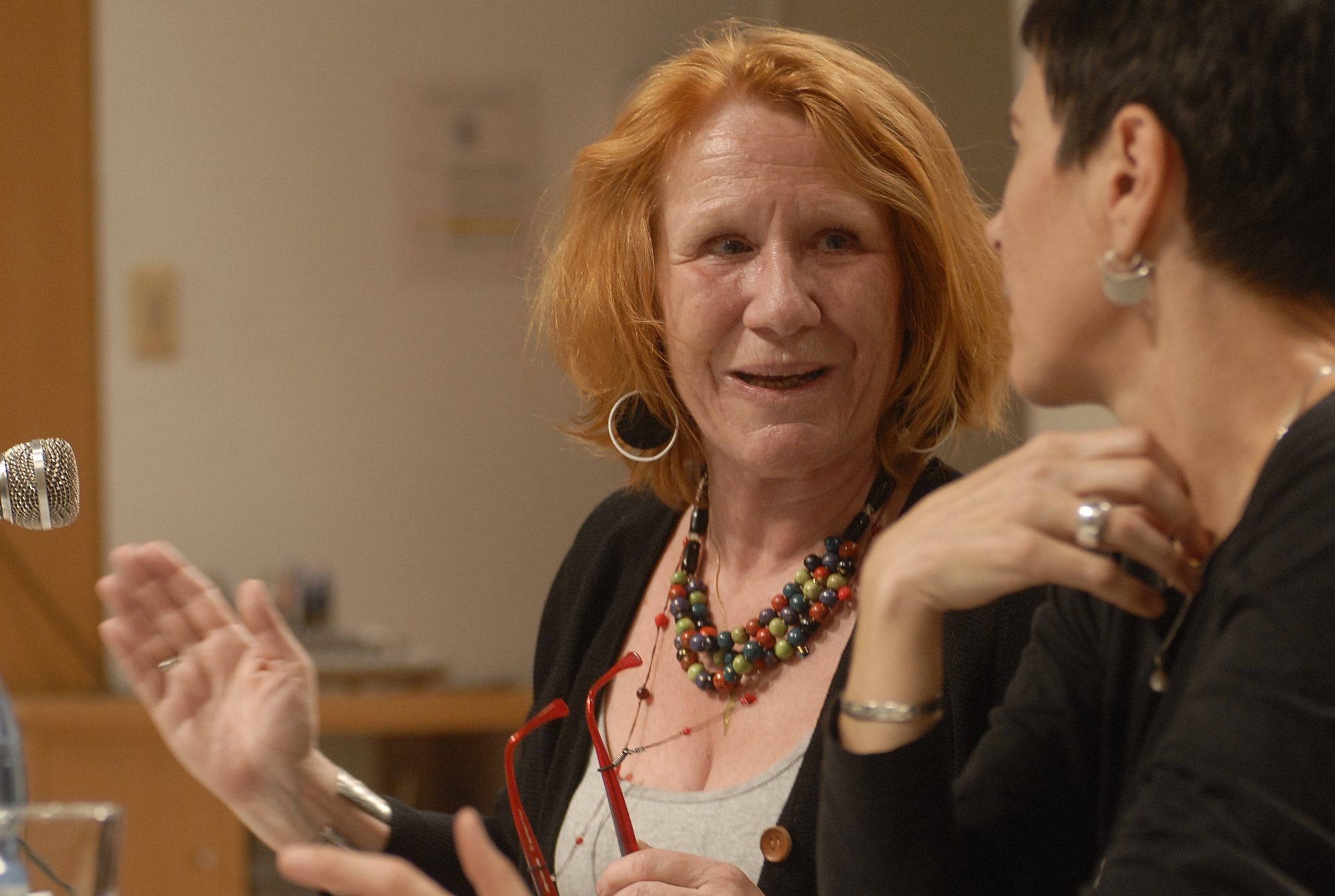 Irène Attinger fue invitada por la Escuela de Arte UC junto con el Centro Cultural de la Embajada de Francia para presentar su trabajo en la Casa Europea de Fotografía y exponer su visión de la fotografía latinoamericana.